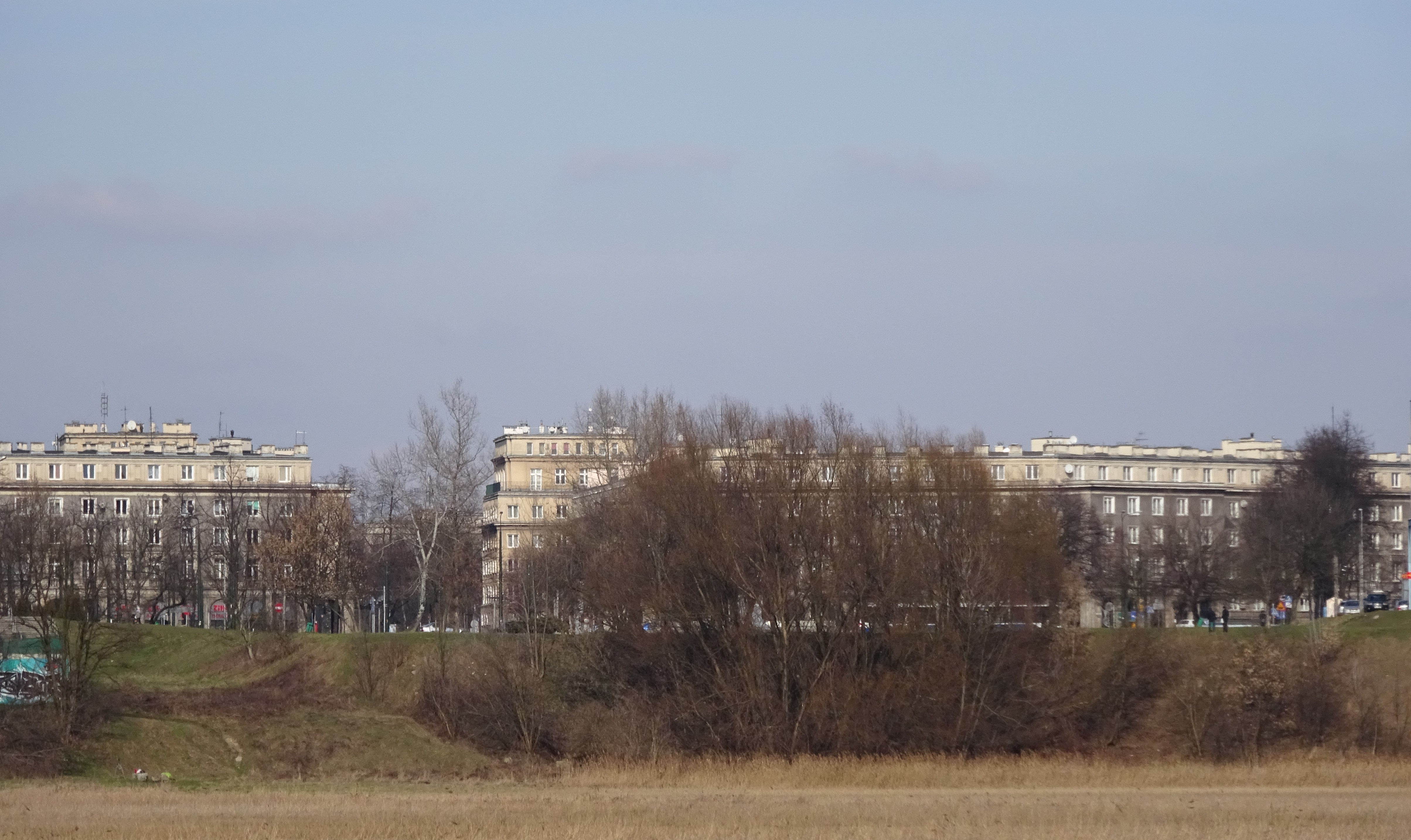 Zabudowa Placu Centralnego w Krakowie-Nowej Hucie widziana z Łąk Nowohuckich. 2016